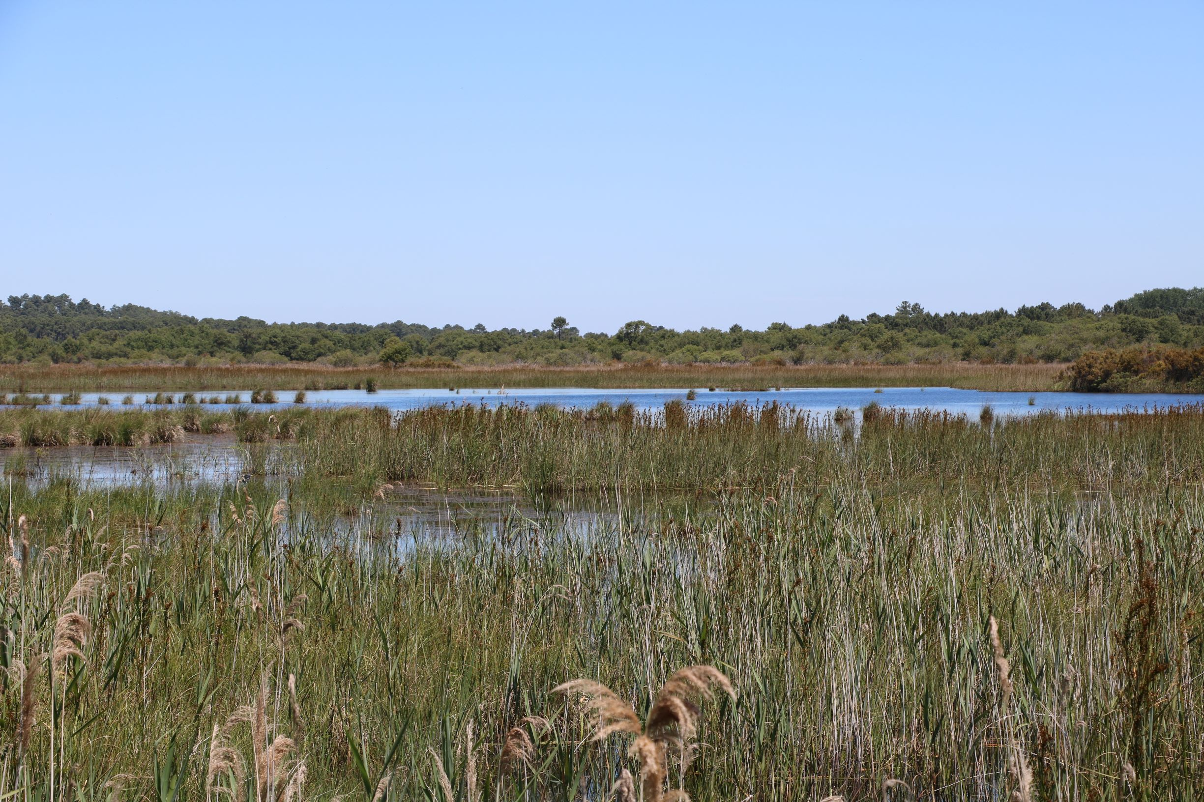 Les marais d'Hourtin abritent des reptiles, amphibiens et mammifères régionaux avec notamment la cistude d'Europe, le lézard ocellé, le vison d'Europe et la loutre. Ils constituent une zone privilégiée pour l'hivernage d'oiseaux migrateurs comme la sarcelle d'hiver ou l'oie cendrée, et pour la nidification de rapaces comme le busard cendré. Les boisements présentent un fort développement des feuillus, notamment le chêne vert et le chêne pédonculé.